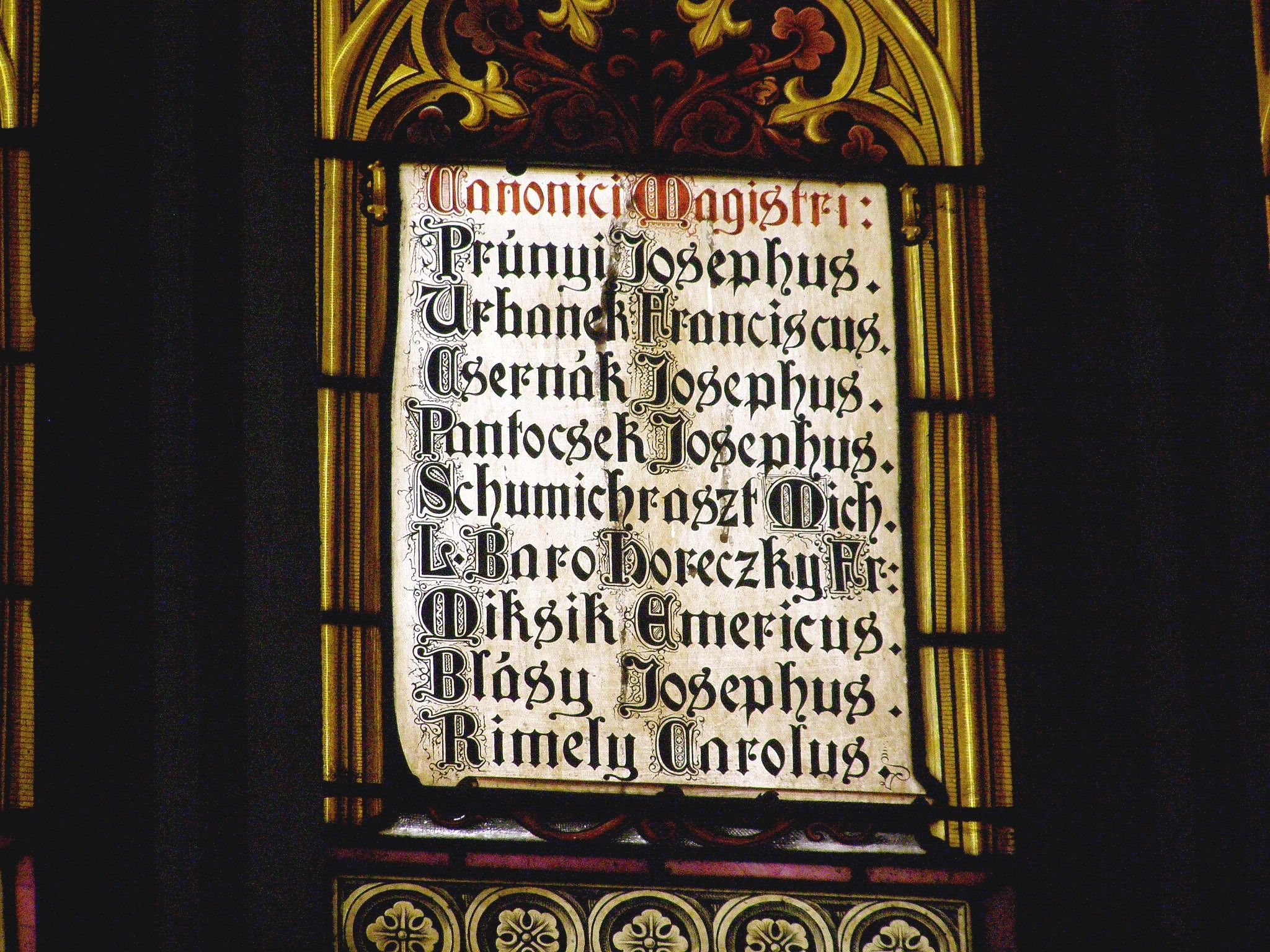 Spodná časť druhého poľa (zľava) okna kanonikov obsahuje menoslov deviatich kanonikov-magistrov, z ktorých sa viacerí významne zapísali do slovenských dejín. Jozef Prúnyi - v r. 1853 sa stal dómskym kanonikom, bol profesorom filozofie, autorom viacerých kazateľských a filozofických diel František Urbánek - dómsky kazateľ ale aj vynikajúci pomológ Jozef Csernák - kanonik, člen Spolku na reštaurovanie Dómu Jozef Pantocsek - spoluzakladateľ Matice slovenskej a Spolku svätého Vojtecha Michal Schumichraszt - pochádzal zo šľachtickej rodiny, bol doktorom filozofie a apoštolským protonotárom František Horetzky - od roku 1882 mestský farár, člen Spolku na reštaurovanie Dómu, profesor cirkevných dejín a práva, autor mnohých odborných článkov Imrich Miksik - od roku 1864 prešporský kanonik, autor viacerých kázní písaných bernolákovčinou Jozef Blásy - ostrihomský diecézny cenzor, kustód dómskej kapituly, farár v Maduniciach Karol Rimély - učiteľ dejín a práva (o.i. učil maďarčinu následníka trónu Rudolfa), dómsky kanonik, mestský farár